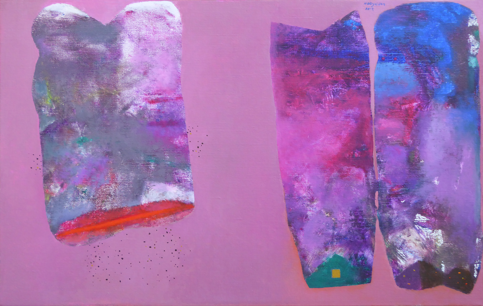 En oljemålning, expressiv och lite abstrakt